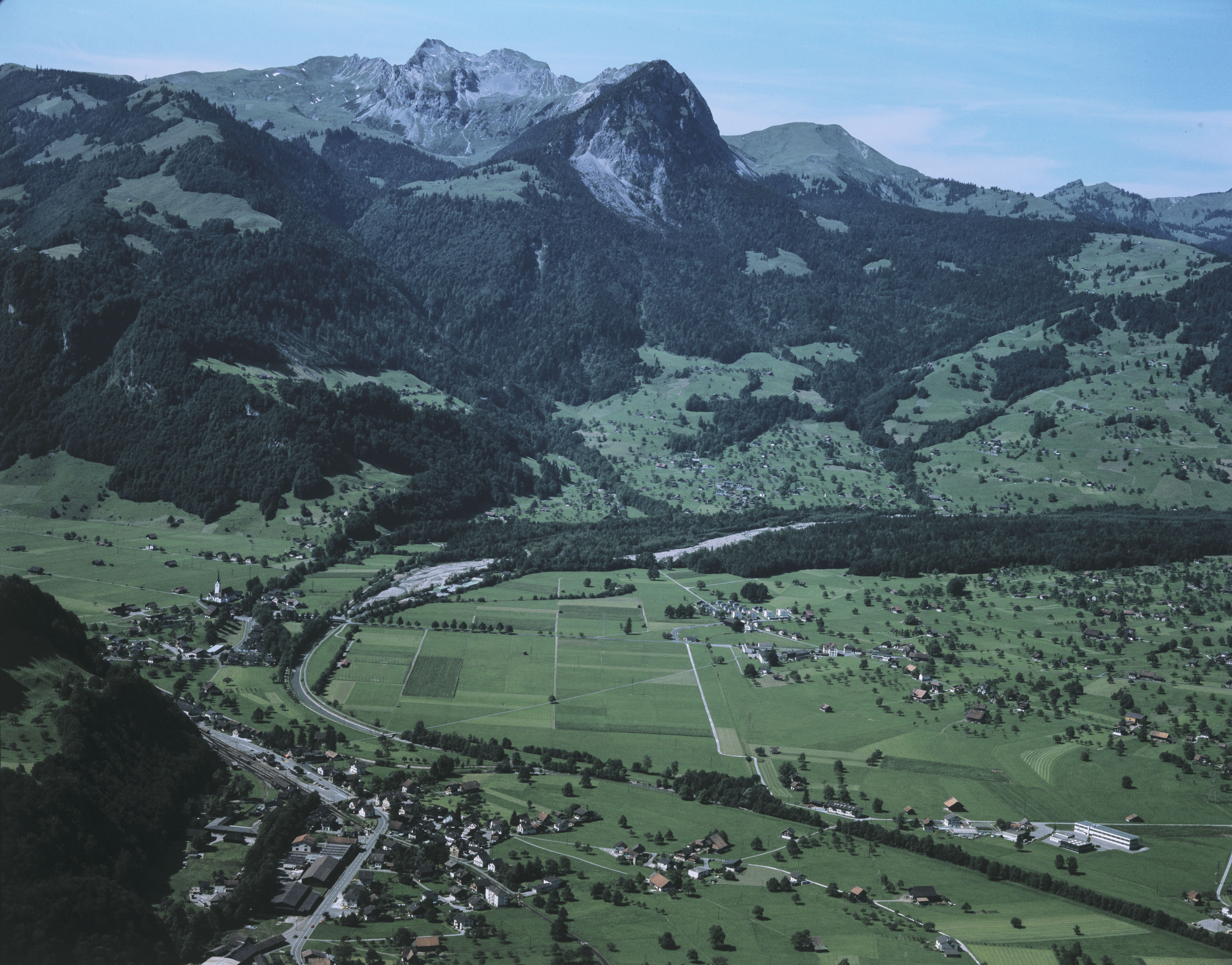 Luftaufnahme Giswil OW, Schweiz